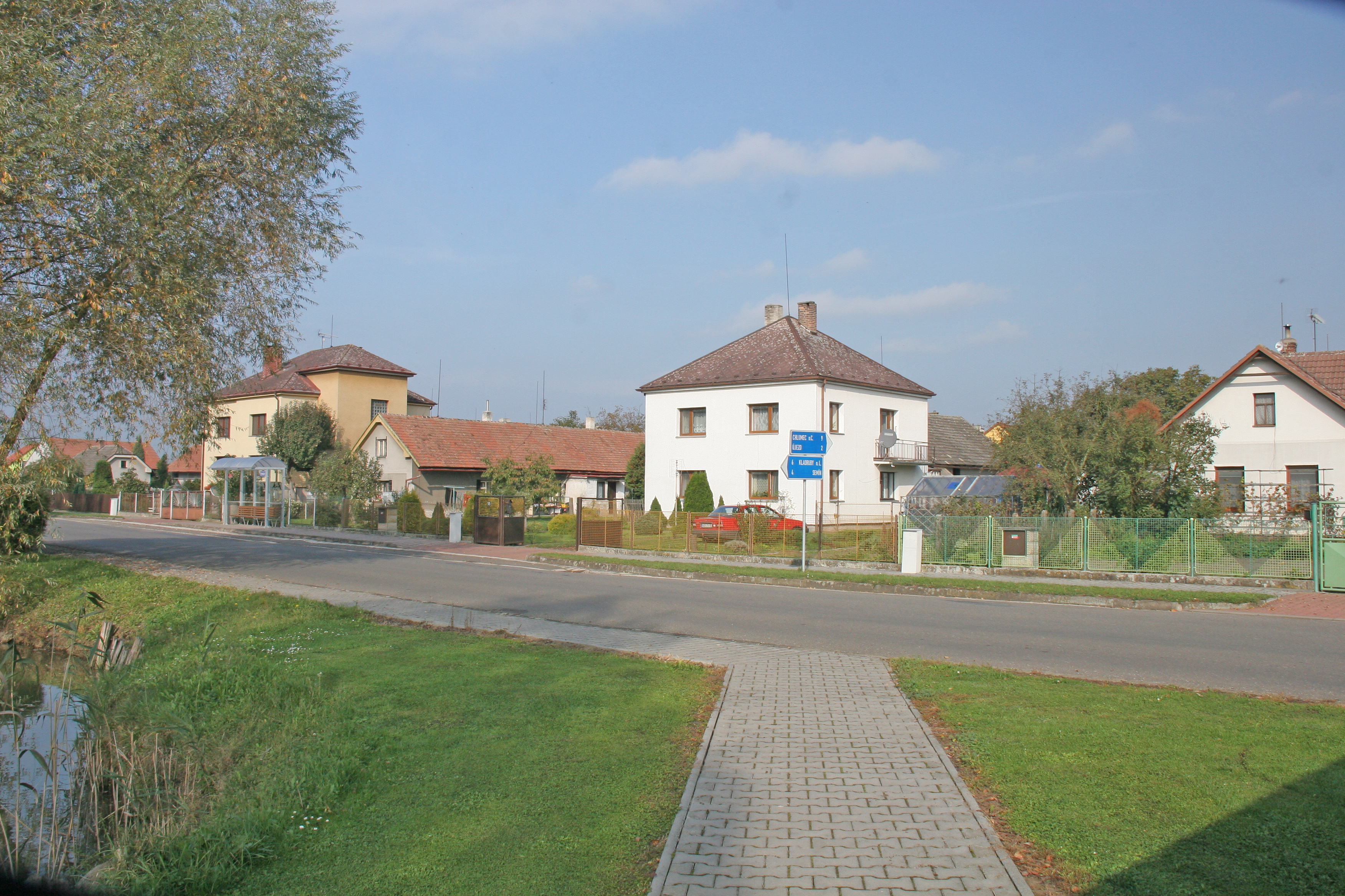 Strašov čp. 85